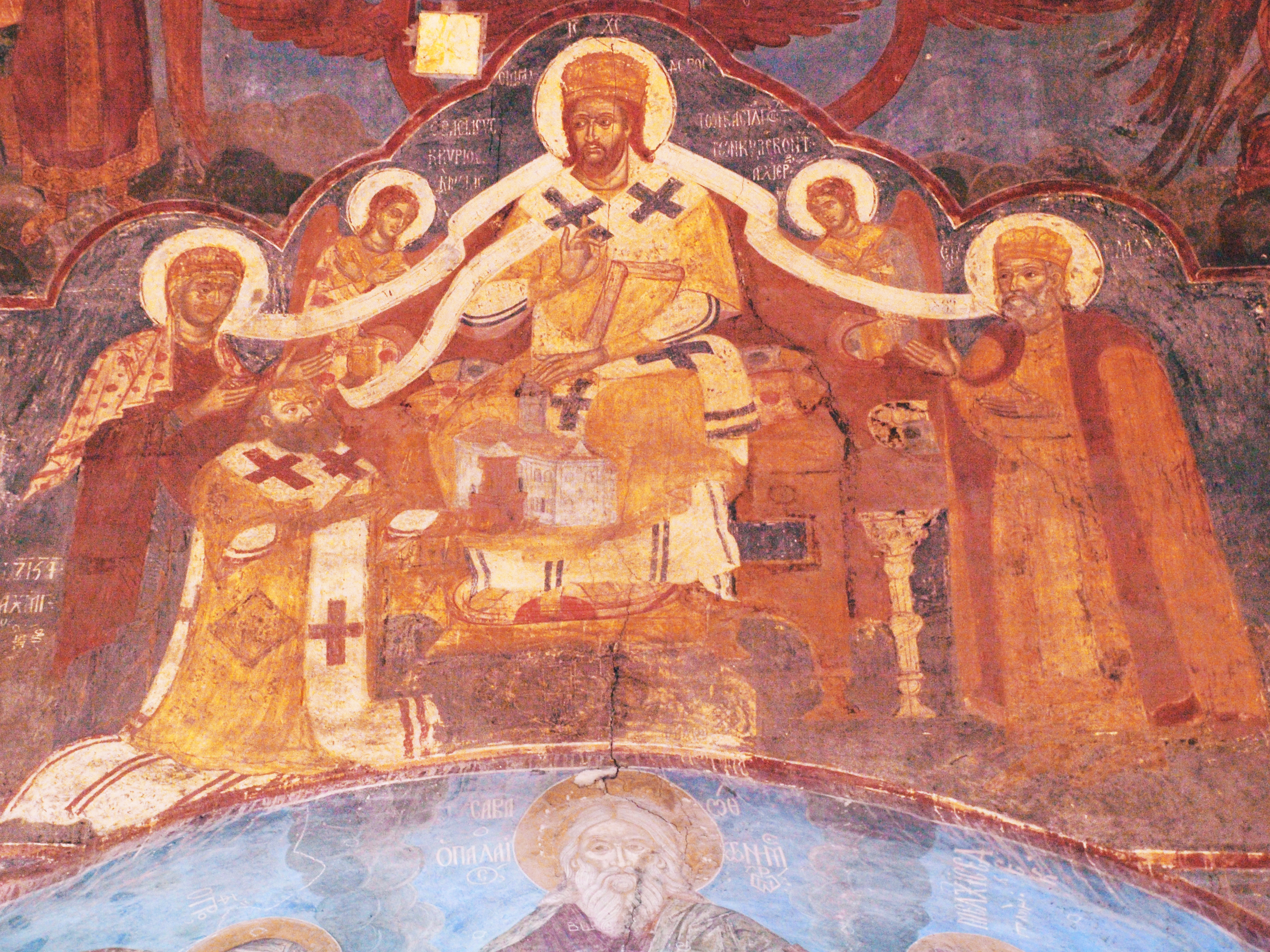 Петро Могила (зліва навколішках) і великий князь Володимир (справа) на фресці. Церква Спаса на Берестові, Київ, вул. Лаврська, 5